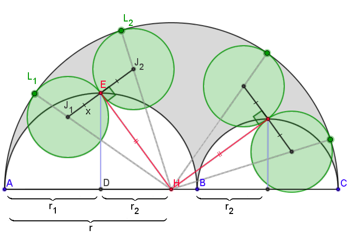 An example of Archimedes' quadruplets